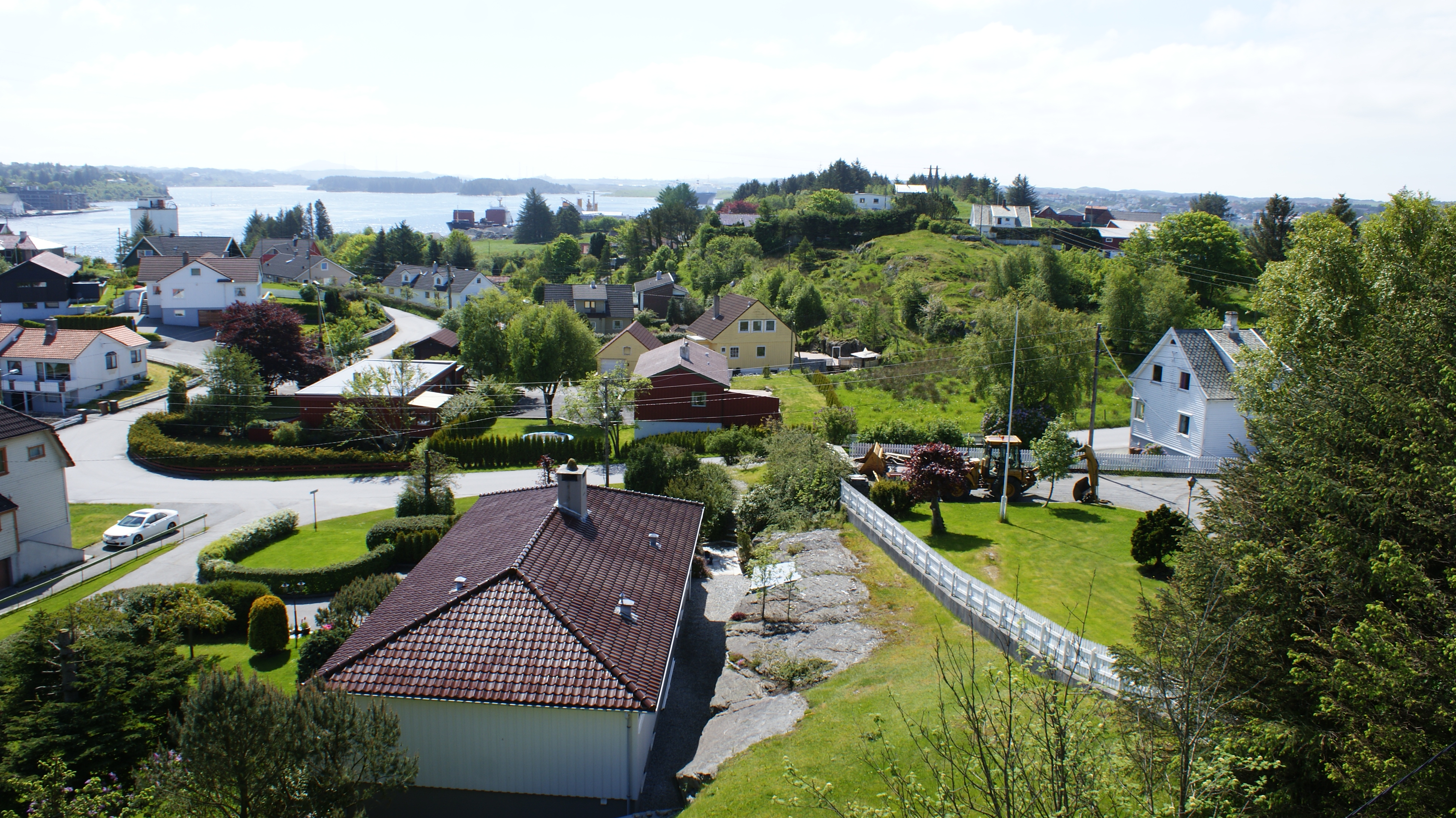 Karmøya, Haugesundet, Rogaland, Norway. Salhus village.